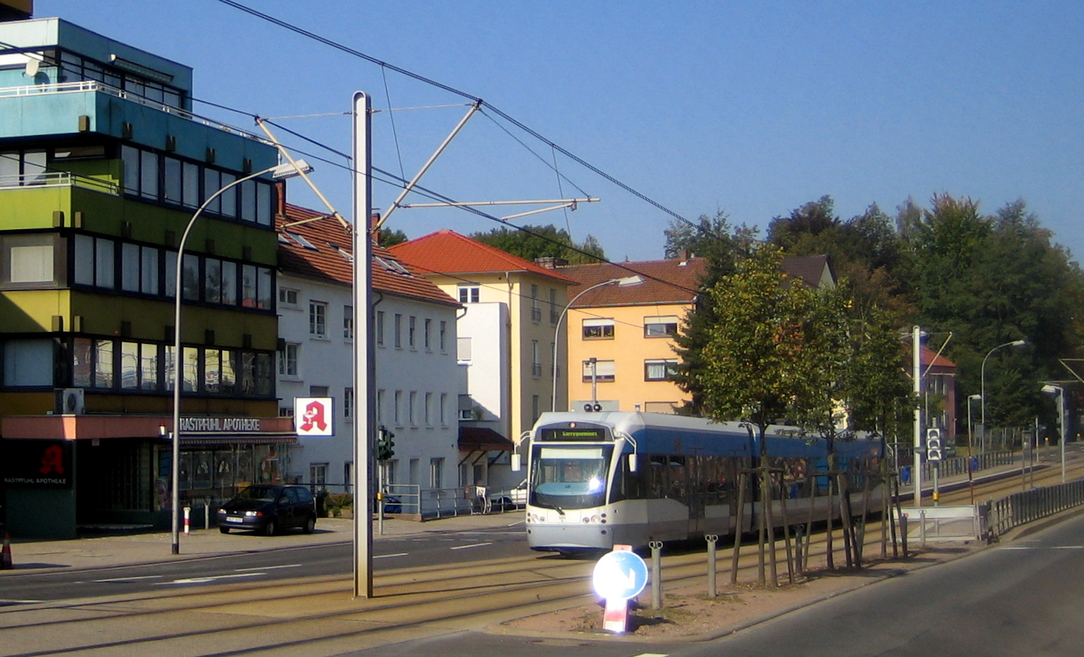 Saarbrücken, Rastpfuhl (Zentrum)